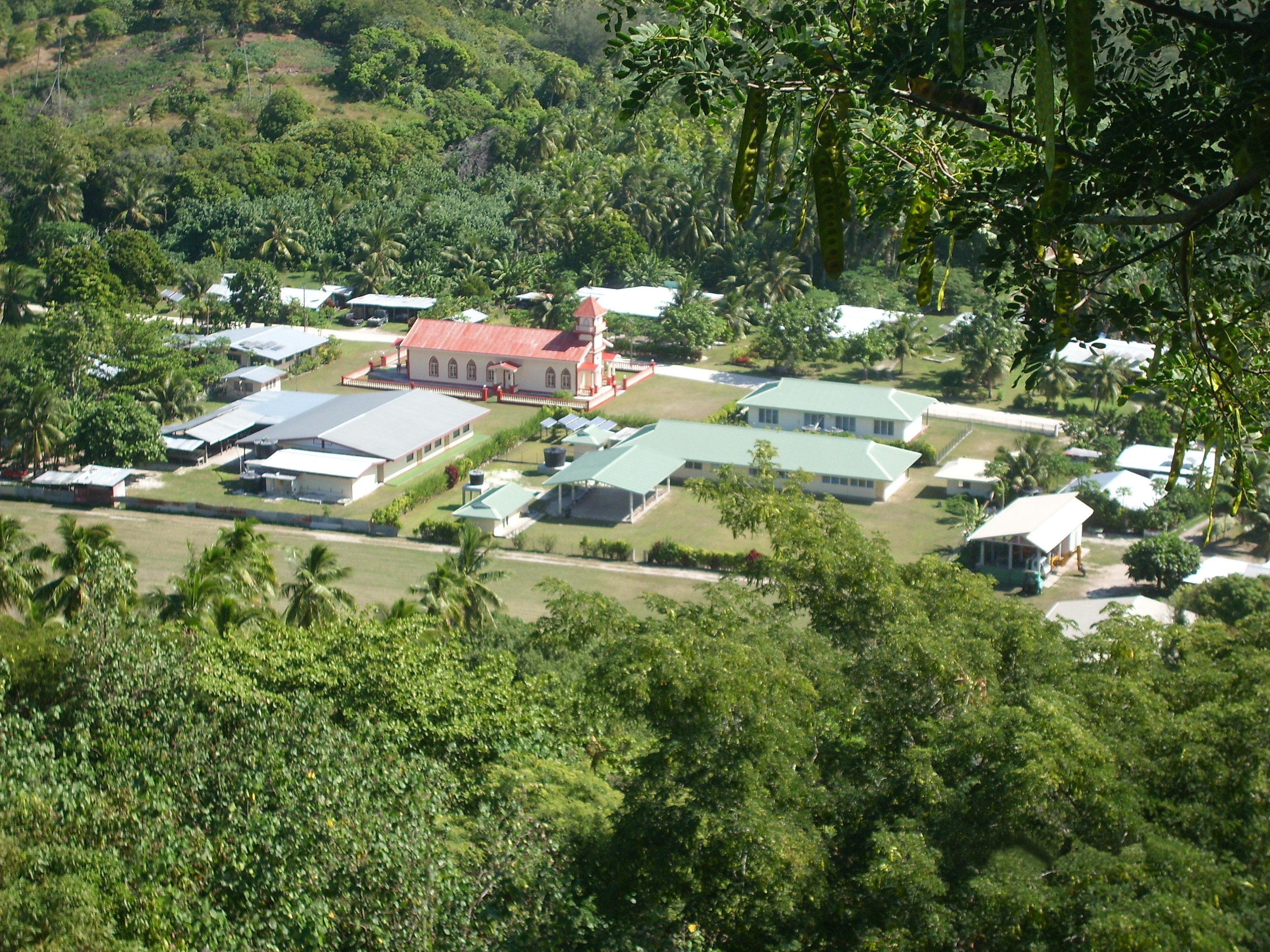 Vue du village de Taora O Mere, située à Maiao